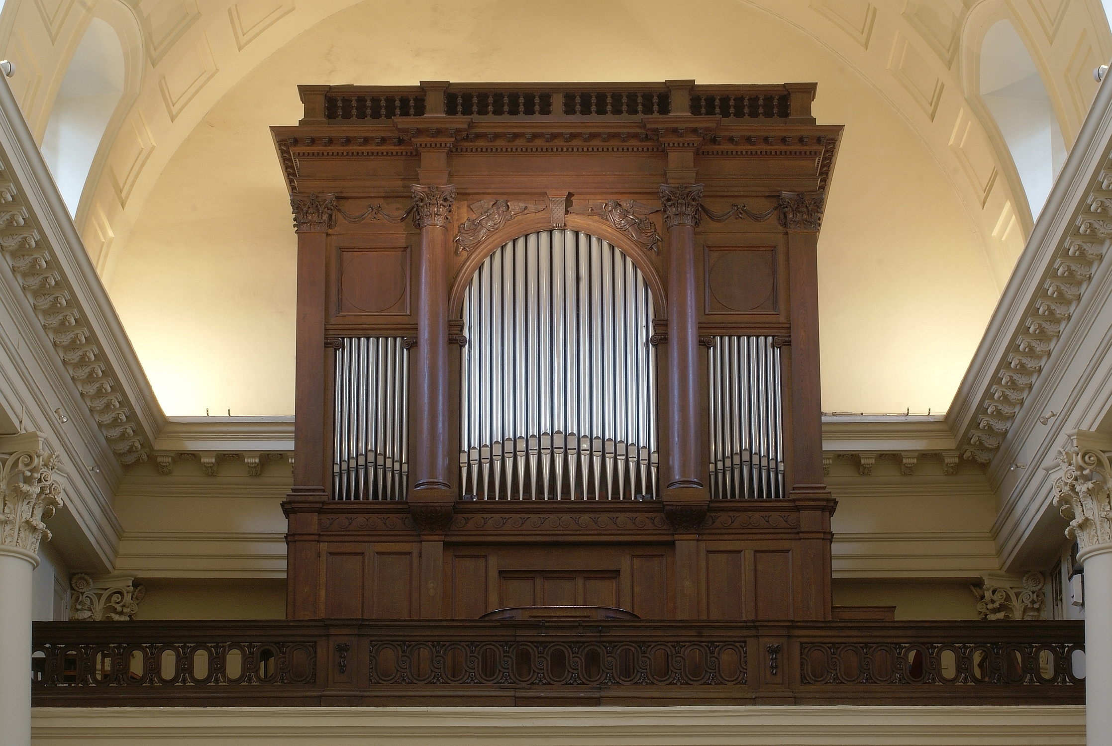 Orgel gemaakt door Pierre Schyven, in de kerk Sint-Jacob-op-Koudenberg te Brussel